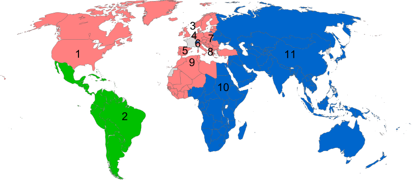 Résultats des élections législatives des Français de l'étranger en 2012